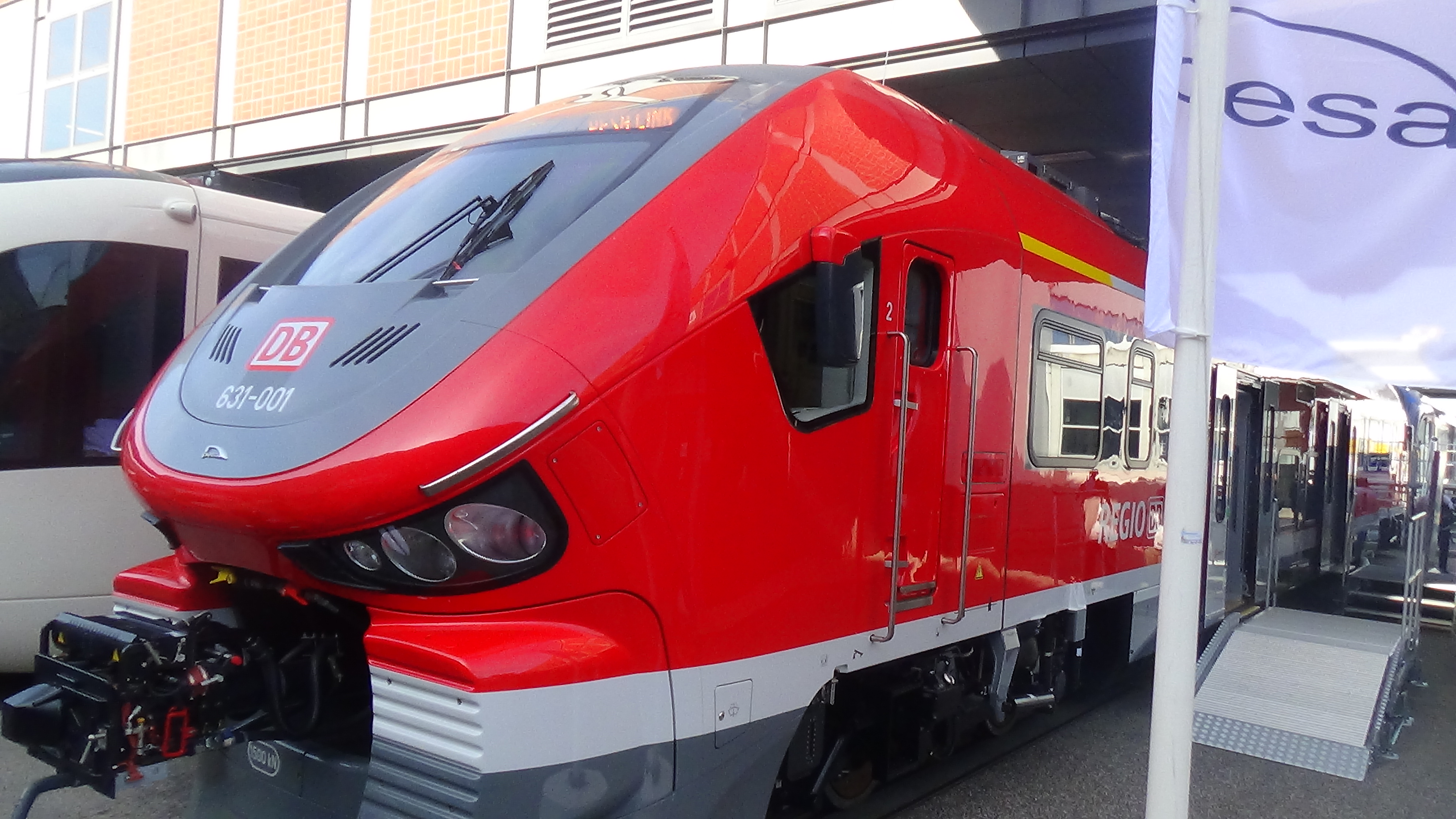 PESA Bydgoszcz SA LINK DB 631-001